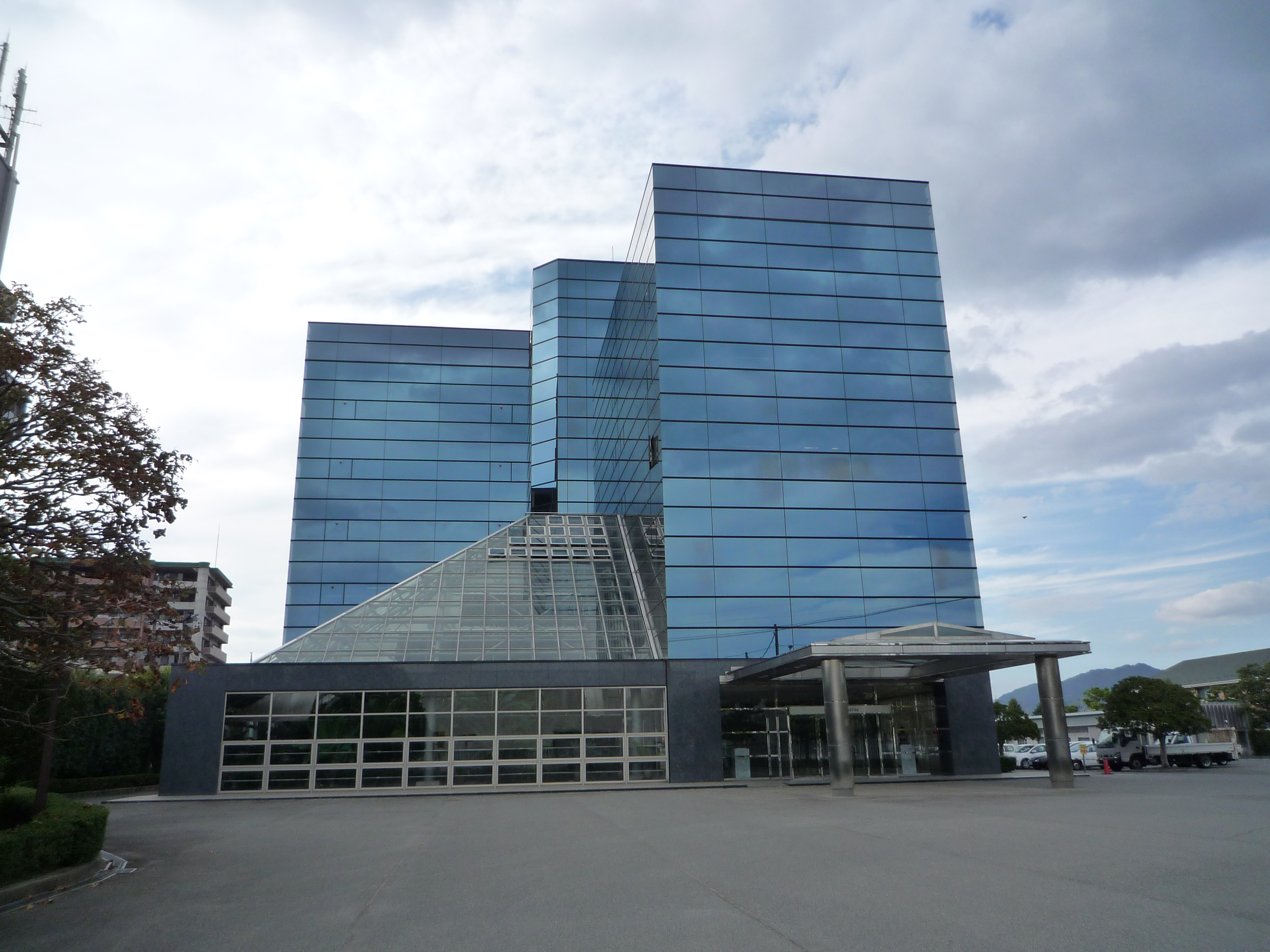 サタケ本社